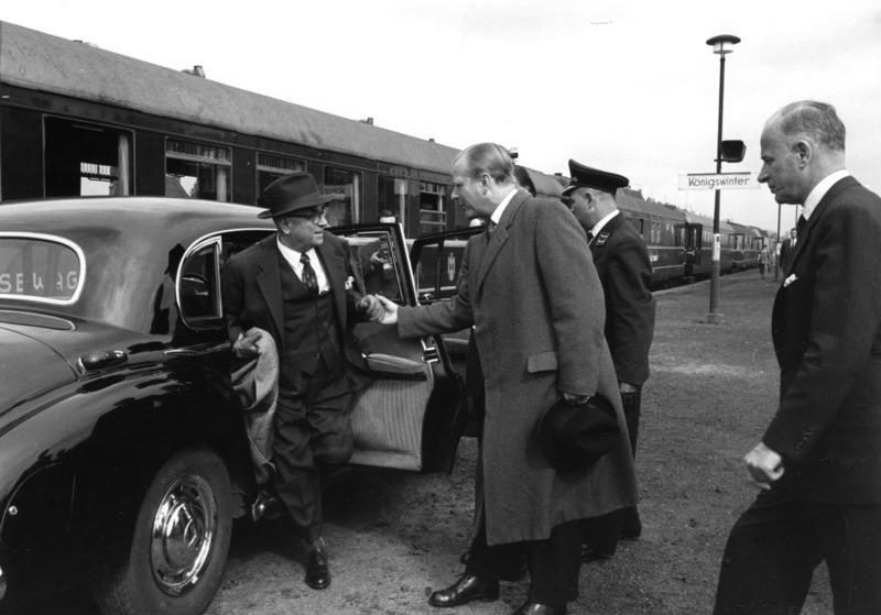 Staatsbesuch des türkischen Staatspräsidenten Bayar in der Bundesrepublik Deutschland Im Bild: Der Protokollchef des Auswärtigen Amtes, Botschafter von Braun, hilft Präsident Bayar aus dem Auto. Im Hintergrund der Sonderzug für den türkischen Staatsgast.